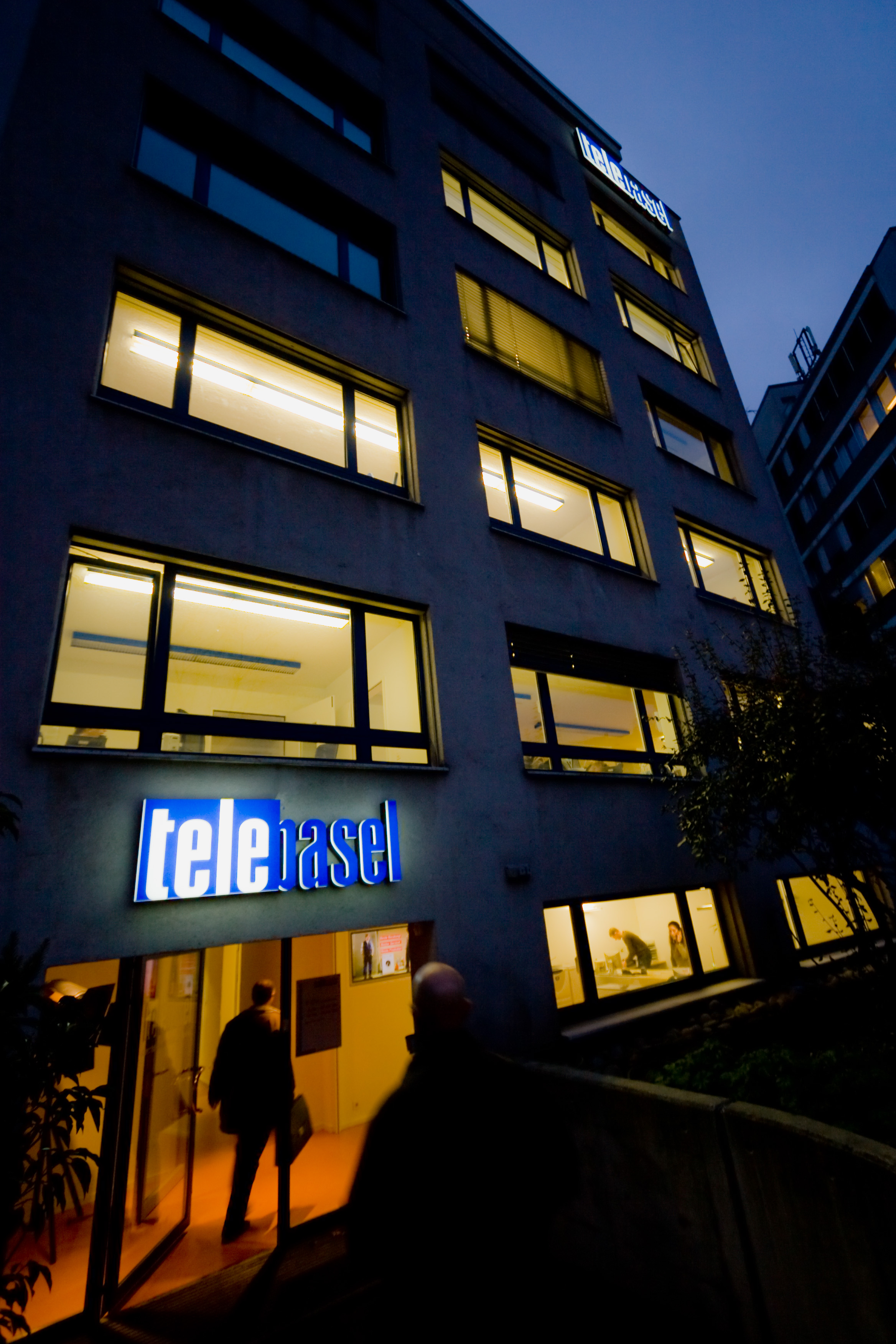 Die Aussenansicht von Telebasel.